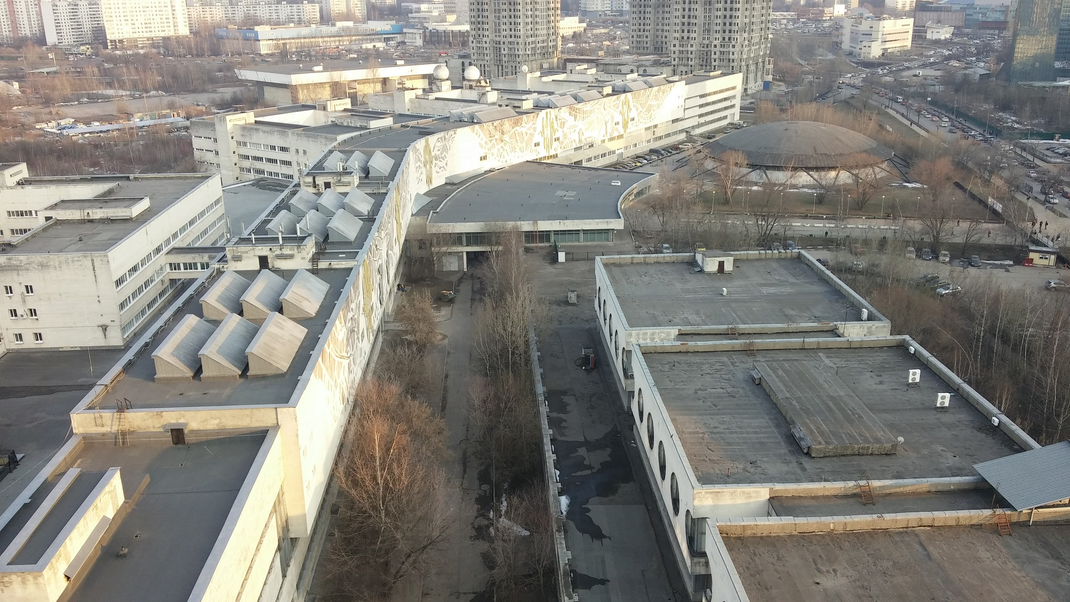 Вид на здание МГТУ МИРЭА в сторону станции метро Юго-Западная.